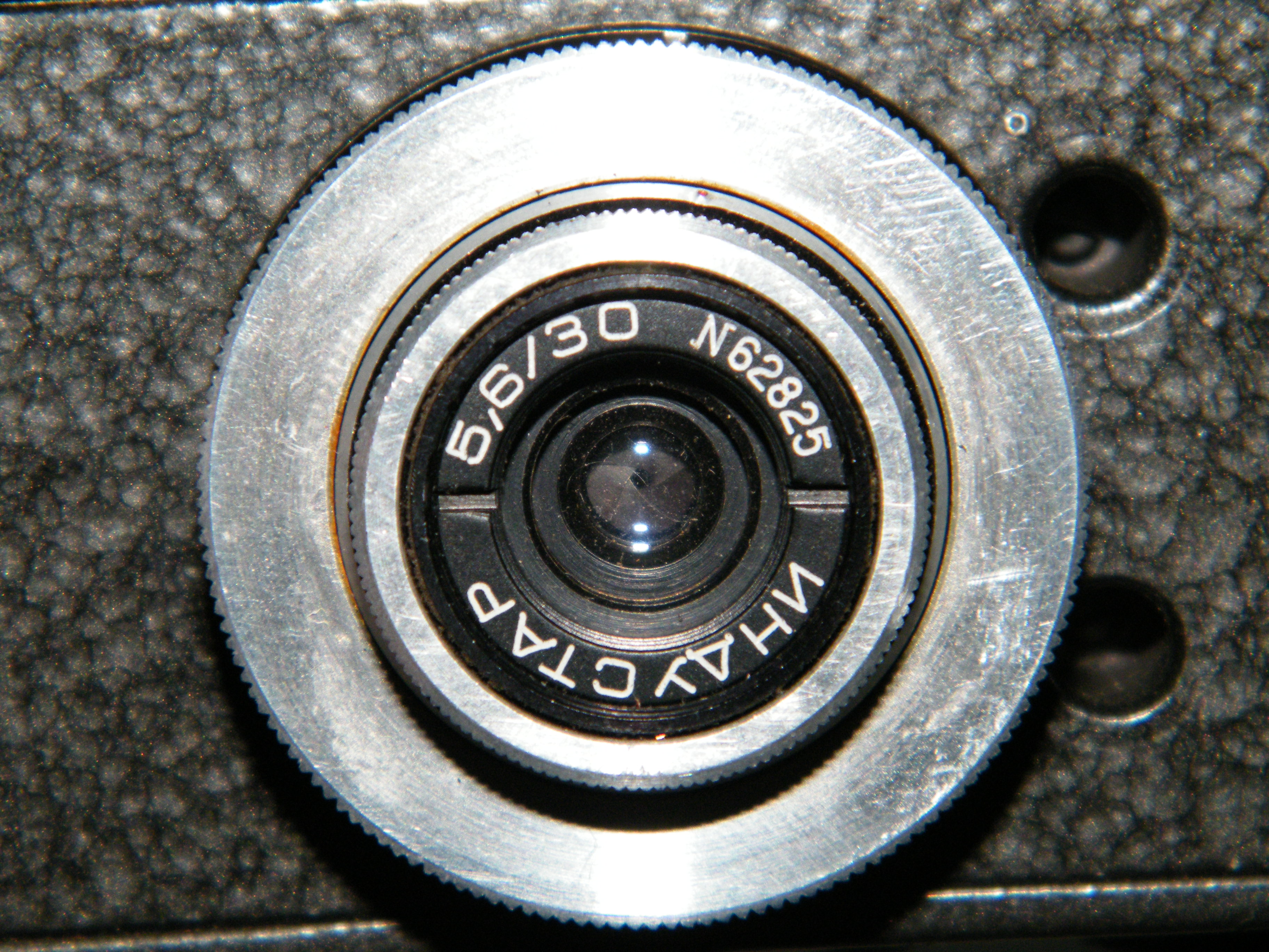 Объектив "Индустар" 5,6/30 от фотоаппарата "Ёлочка"